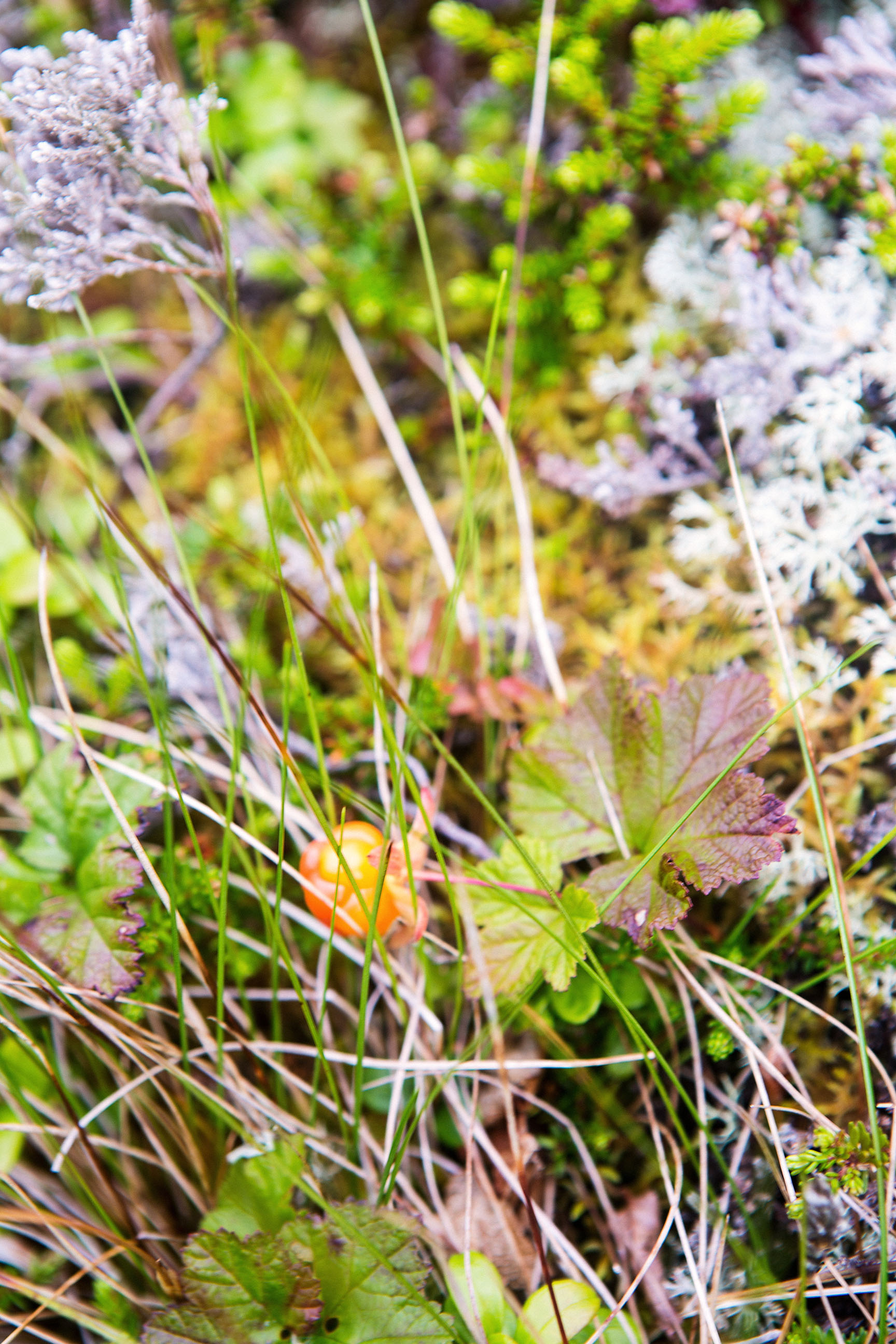 Multe på Bondøya i Vikna på Trøndelagskysten.